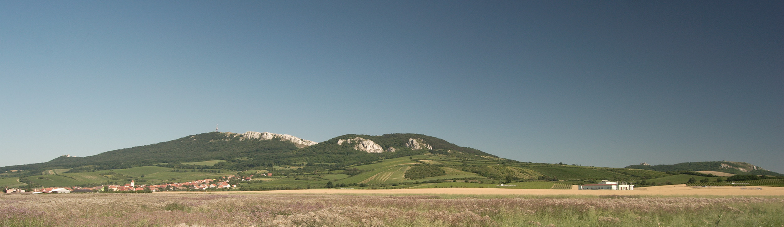 Česky: Pavlovské vrchy od západu